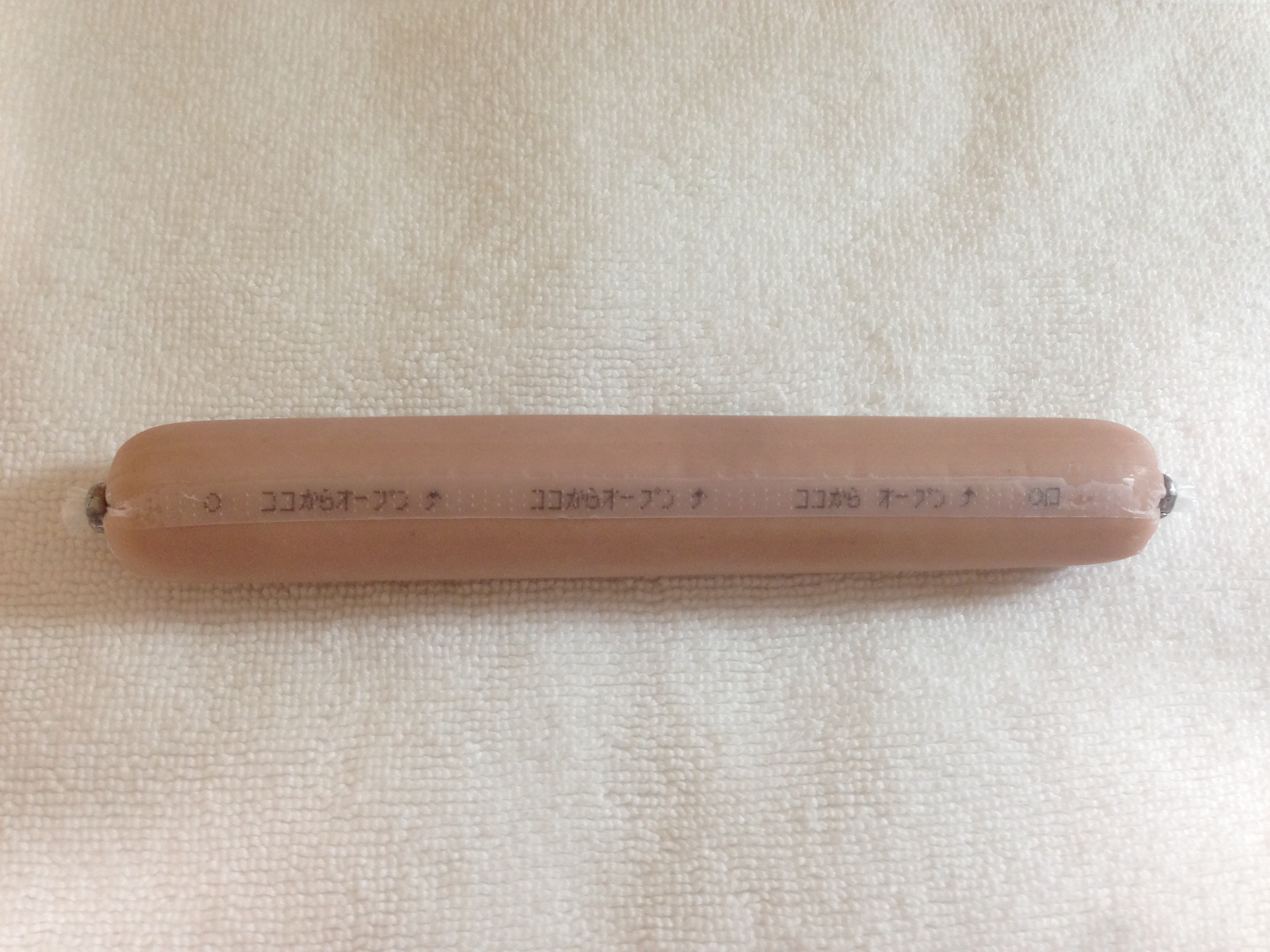 魚肉ソーセージ